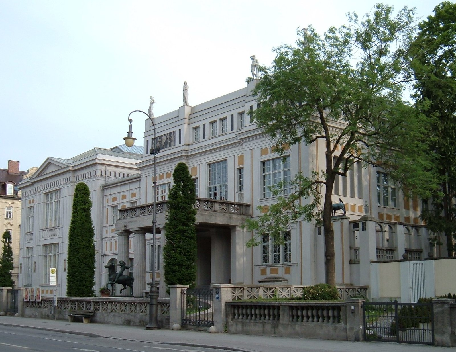 Villa Stuck, Munich, Germany